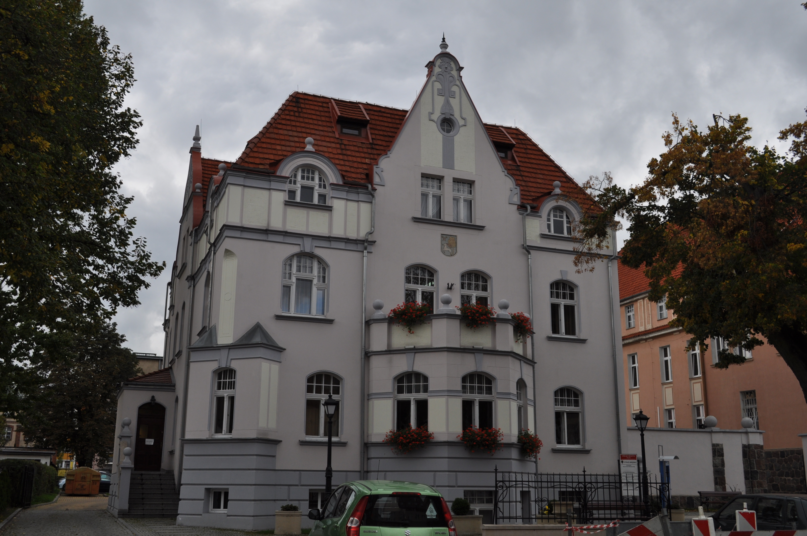 były budynek szkoły muzycznej I stopnia